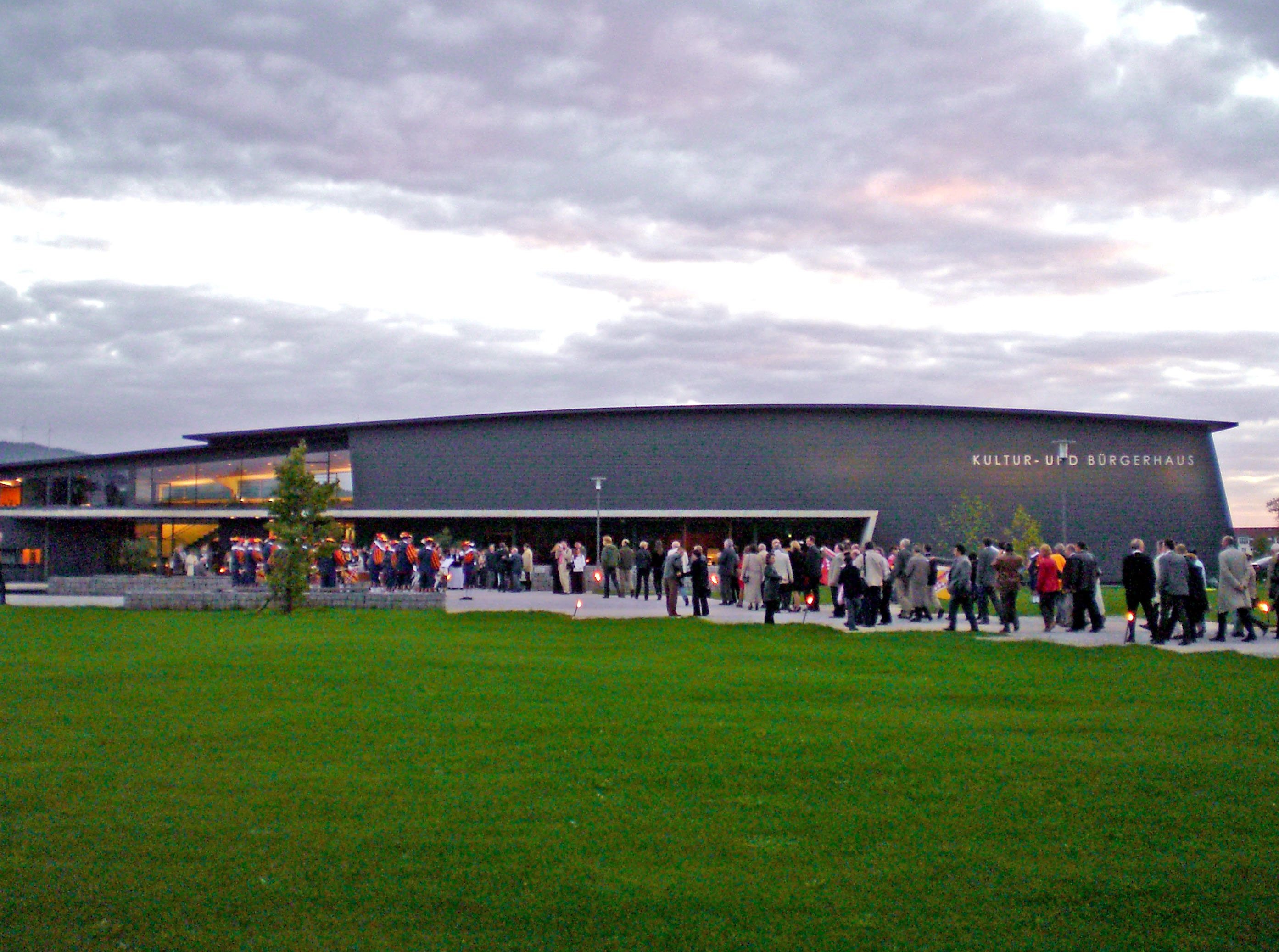 Denzlinger_Kultur_&_Bürgerhaus_nördliche_Ansicht_.jpg